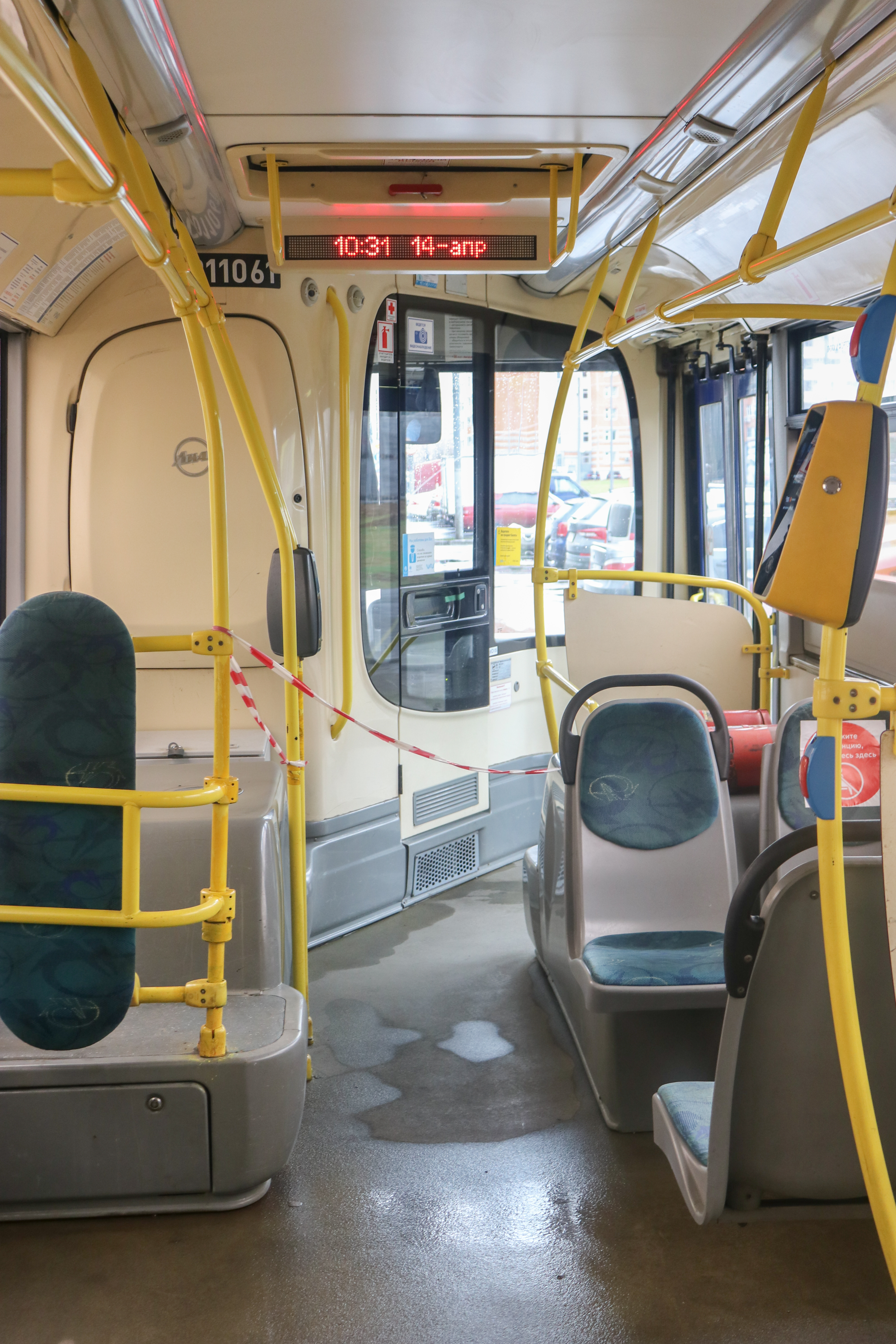 Апрель 2020, период пандемии COVID-19. Закрытая зона в автобусе в Москве около водителя.